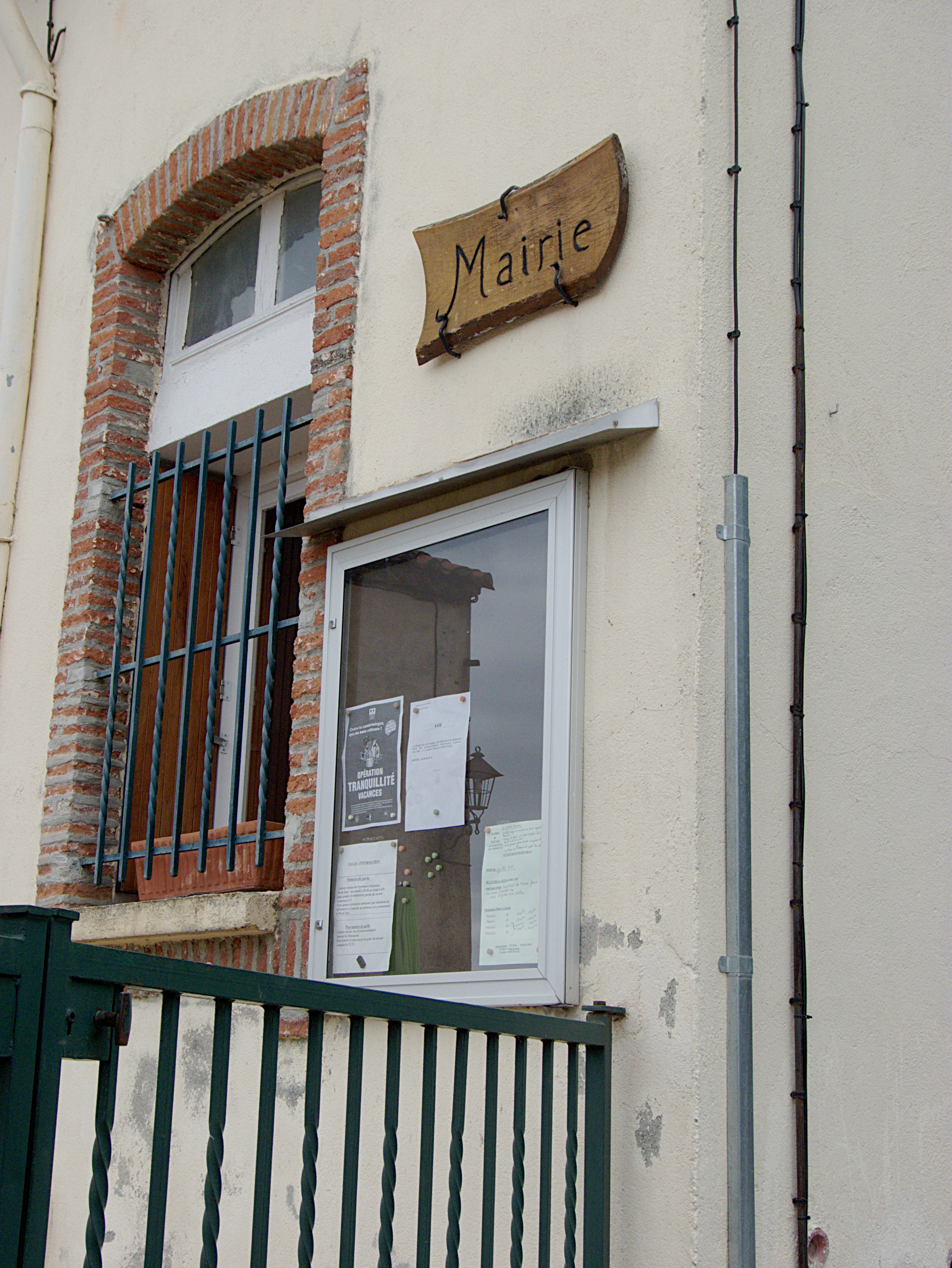 Mairie, Taulis (Pyrénées-Orientales, Languedoc-Roussillon, France)